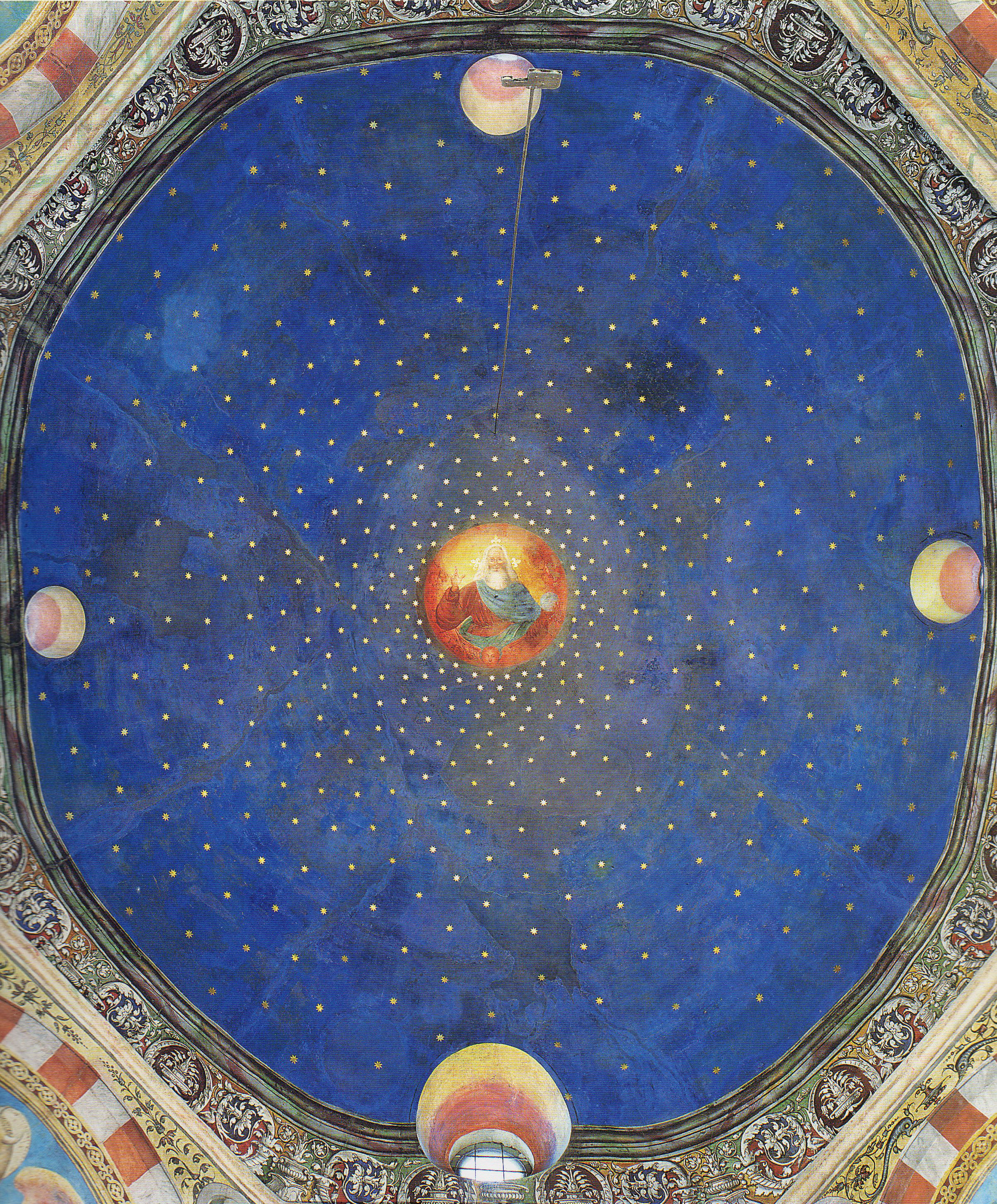 Cupola affrescata di Santa Maria in Solario, oggi parte del Museo di Santa Giulia a Brescia.